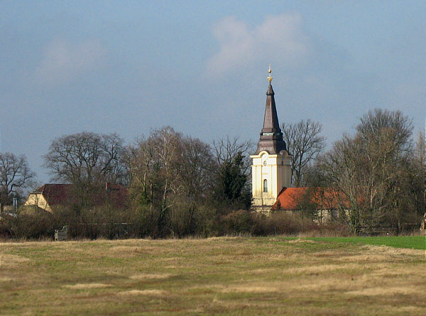 Dorfkirche Stolpe, Pfarrhaus und Kirche von Südosten (Stadt Hohen Neuendorf, Landkreis Oberhavel, Brandenburg).